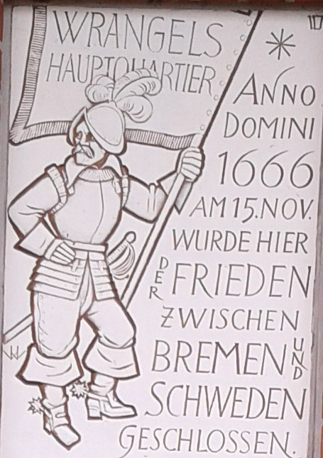 Gedenktafel zum Habenhauser Frieden am ehemaligen Standort der „Schwedenscheune“.